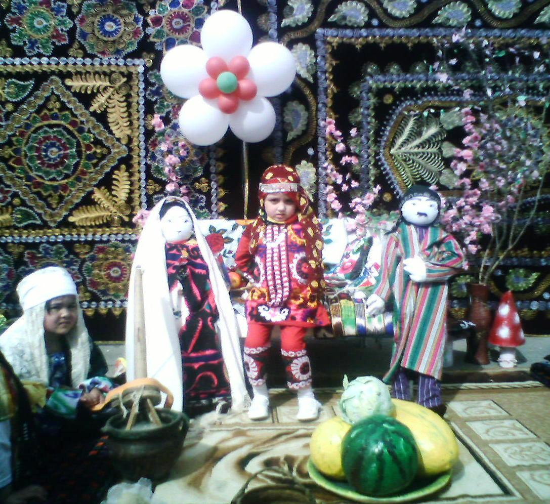 Празднование "Навруз-2013" в Душанбе (Таджикистан) Навруз-2013 (1) -дети в национальной одежде